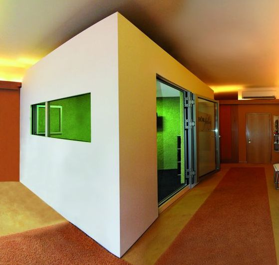 Floatroom von artmix in einem Hörakustik-Fachgeschäft